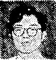 全学連委員長に就任した香山健一（のちに政治学者）